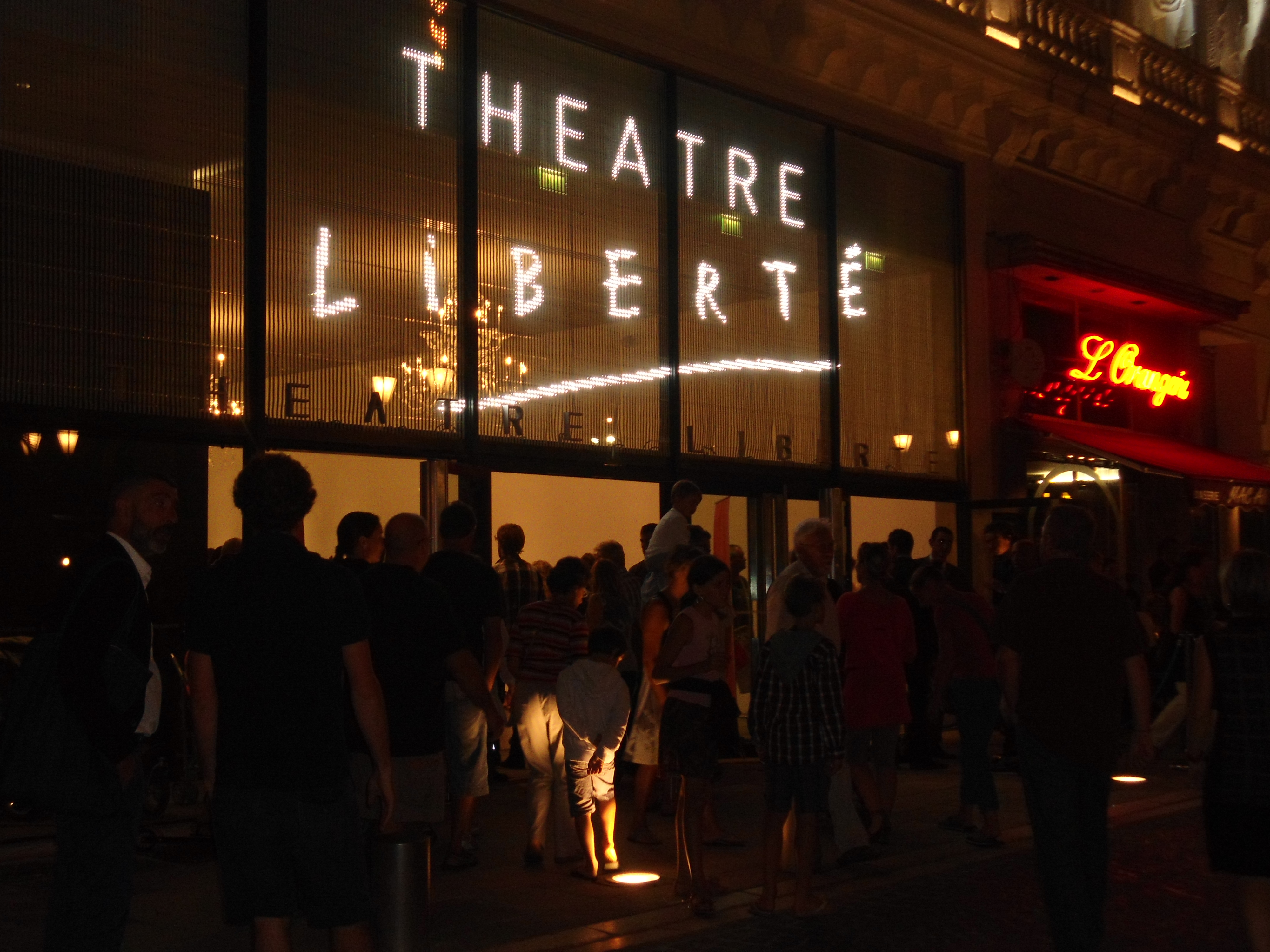 Teatre Liberté, Tolon